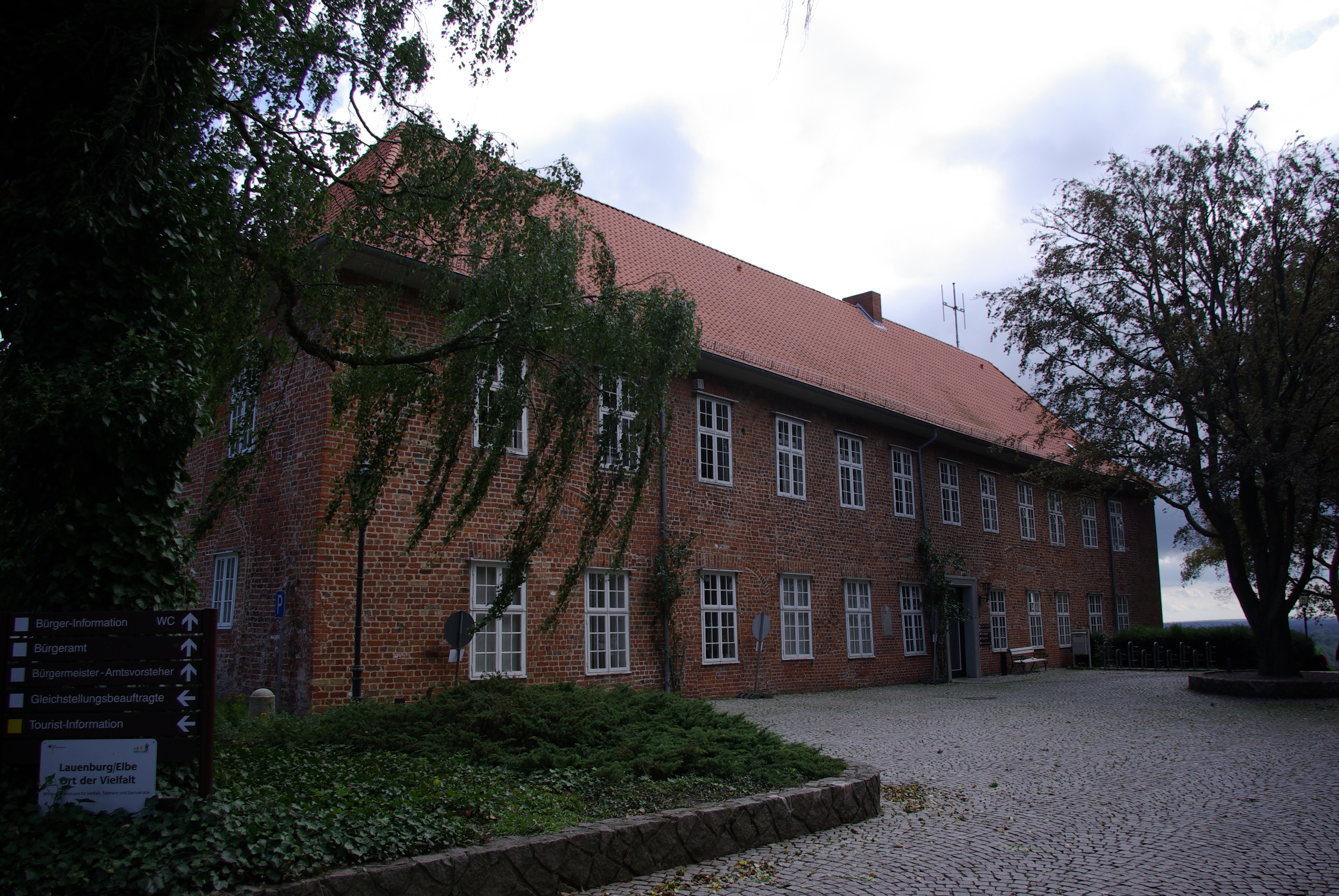 Lauenburg/Elbe in Schleswig-Holstein. Das Schloss steht unter Denkmalschutz. Heute befindet sich hier die Verwaltung des Ortes.